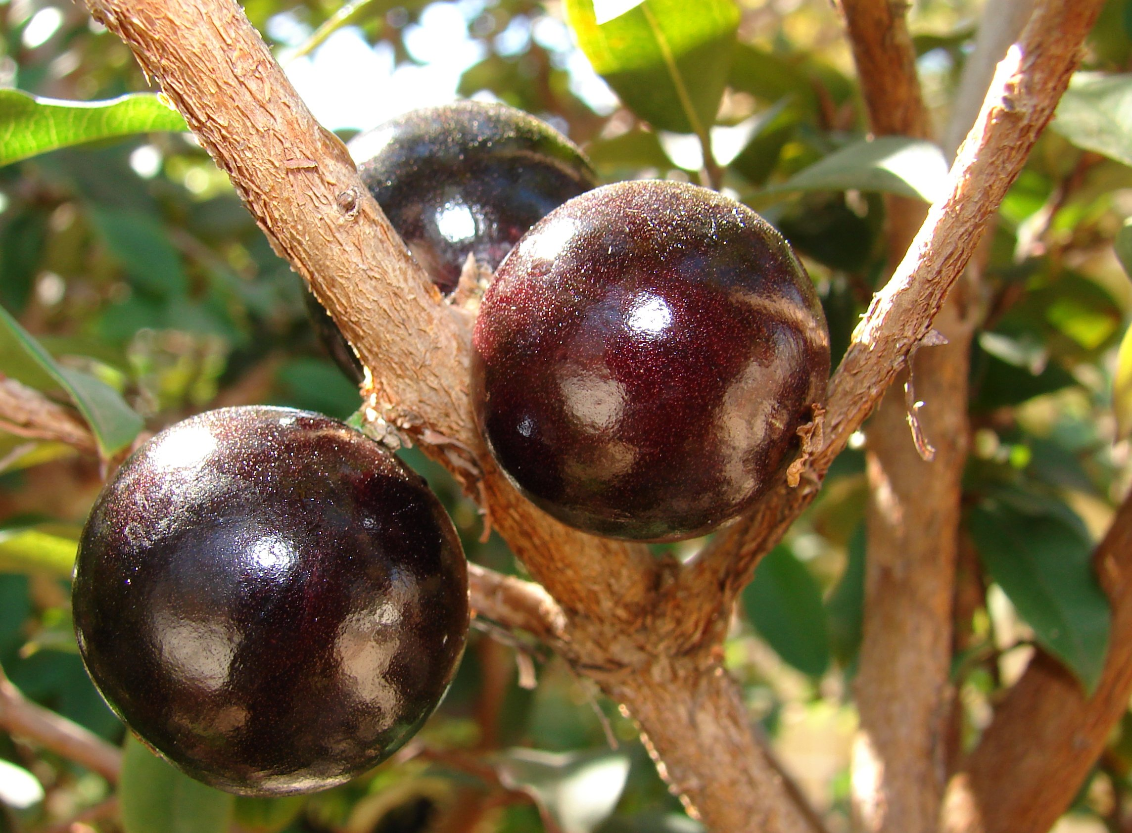 Jabuticaba ripe fruit